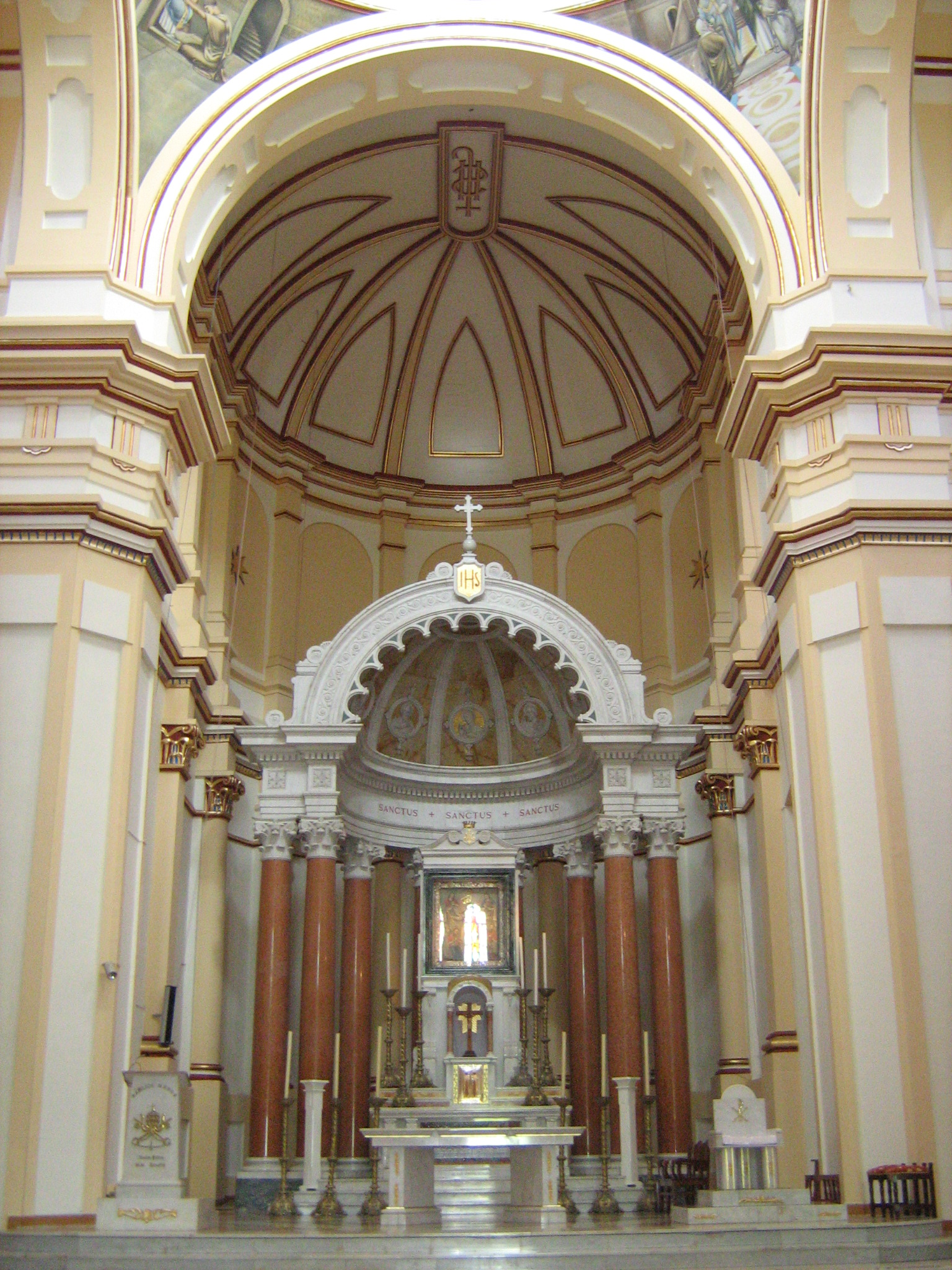 Ábside & Altar de la Basilica de Yarumal, Antioquia, Colombia.